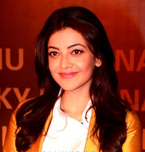 Kajal Aggarwal snapped at Premiere of 'Sarbjit' on May 19, 2016 in Mumbai, India.